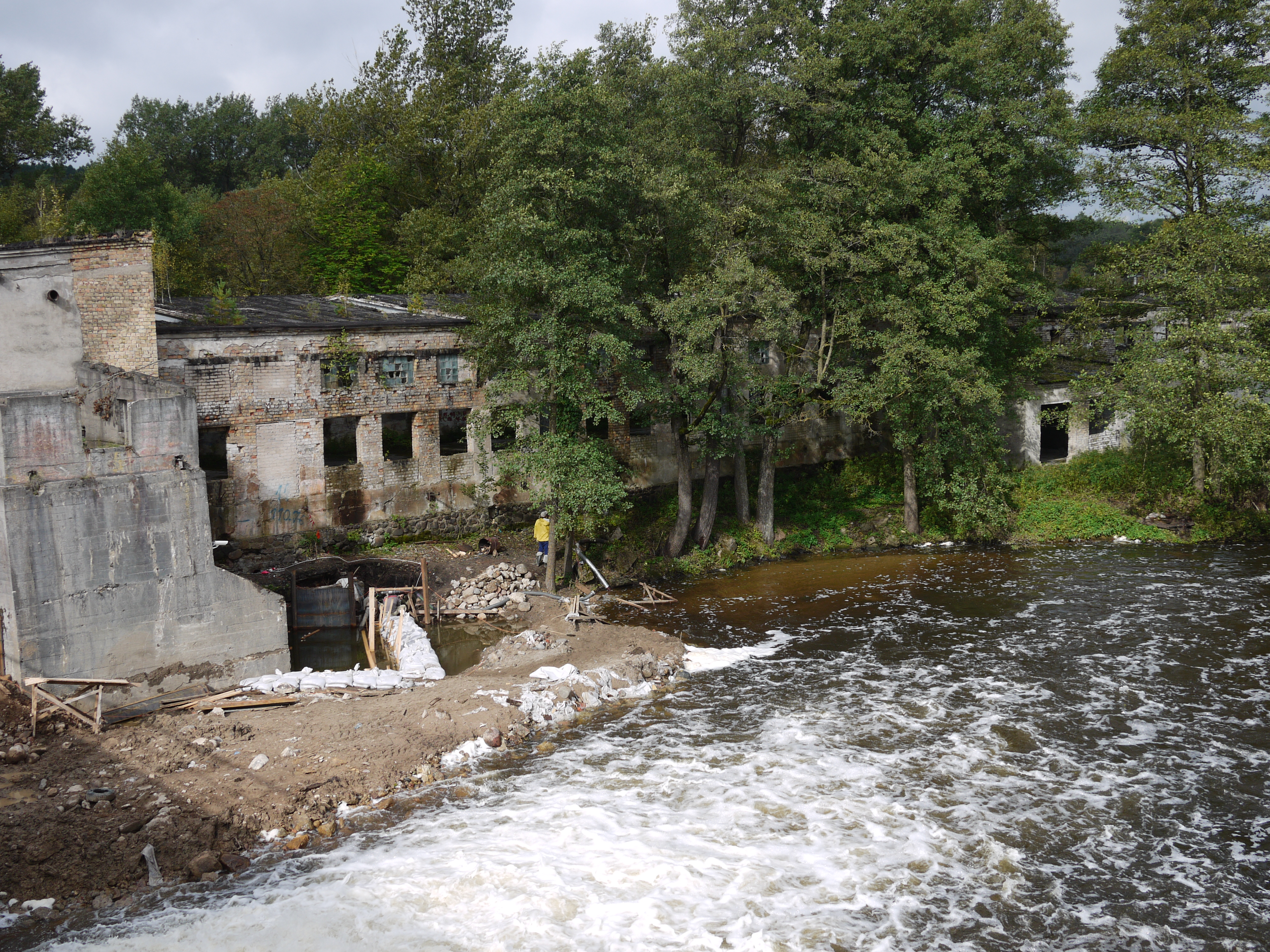 Vokės hidroelektrinė prieš rekonstrukciją